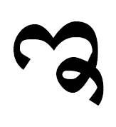 Икараву каннада